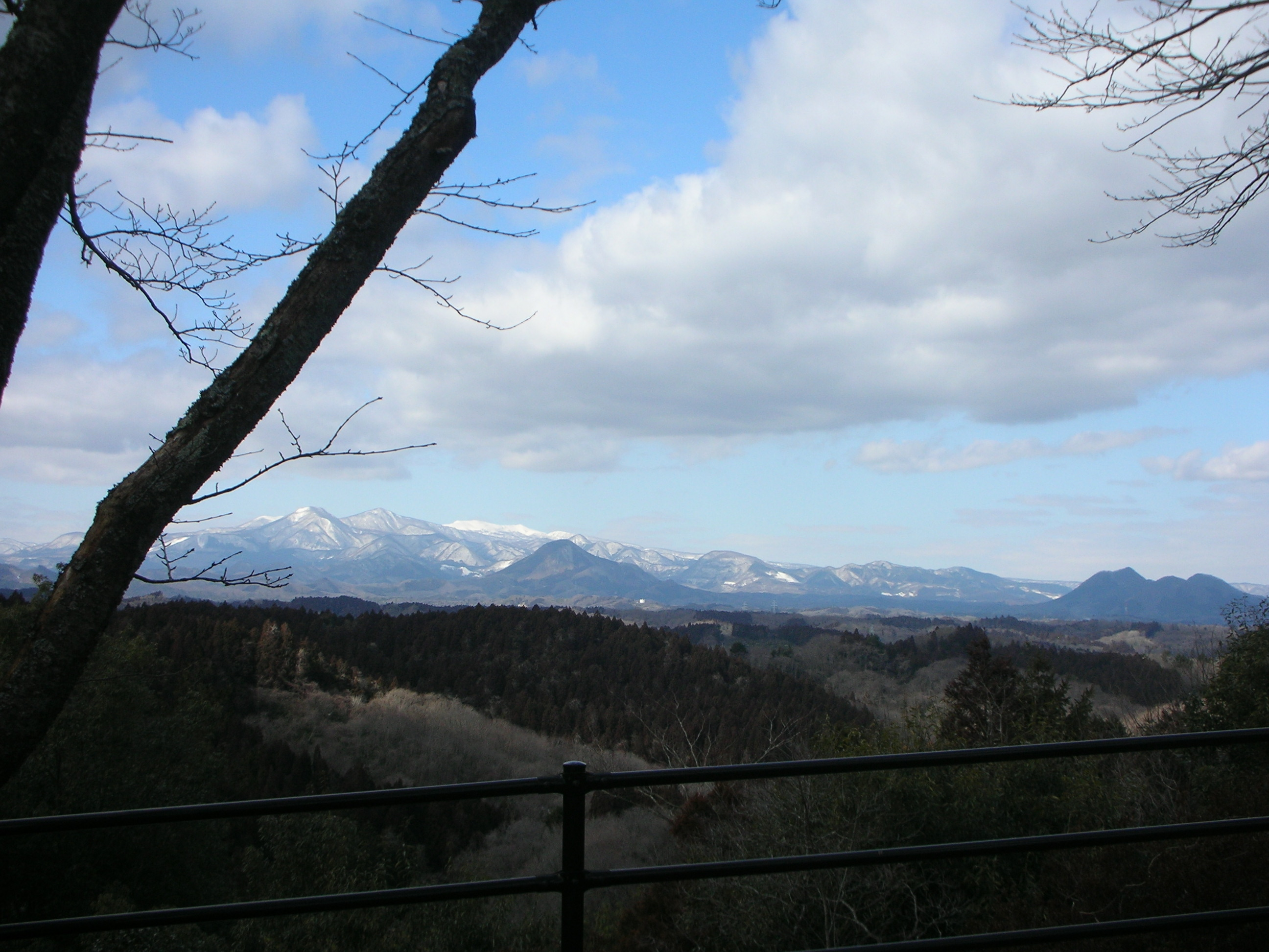 大亀山森林公園シンボルタワー南側より船形連峰を望む